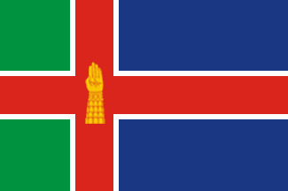 ხონის მუნიციპალიტეტის დროშა